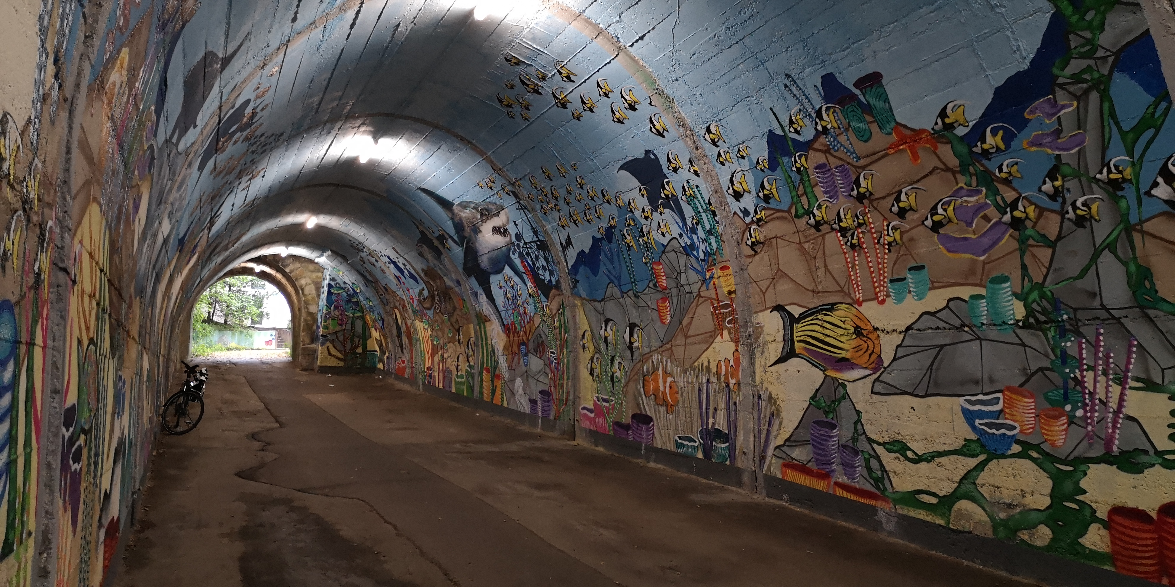 "Aqualand" im Tunnel Grunertstraße Graffiti-Künstler Pascal Maßbaum erstellt